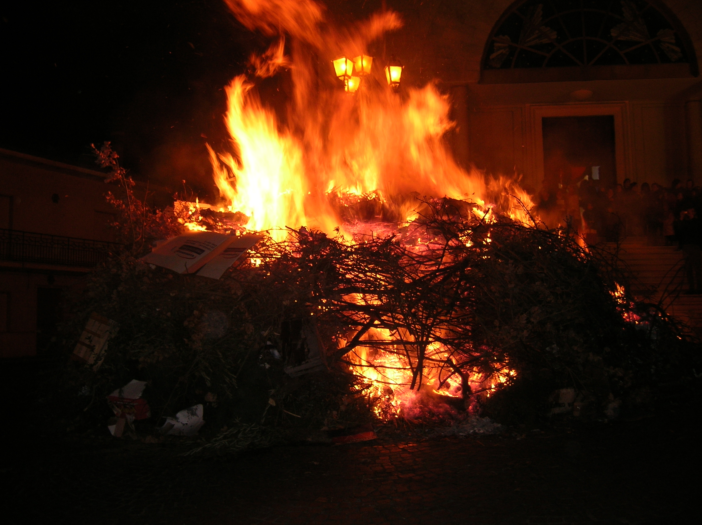 Sturno, provincia di Avellino, Italia - caratteristico falò denominato Vampa re Sant'Antonio.